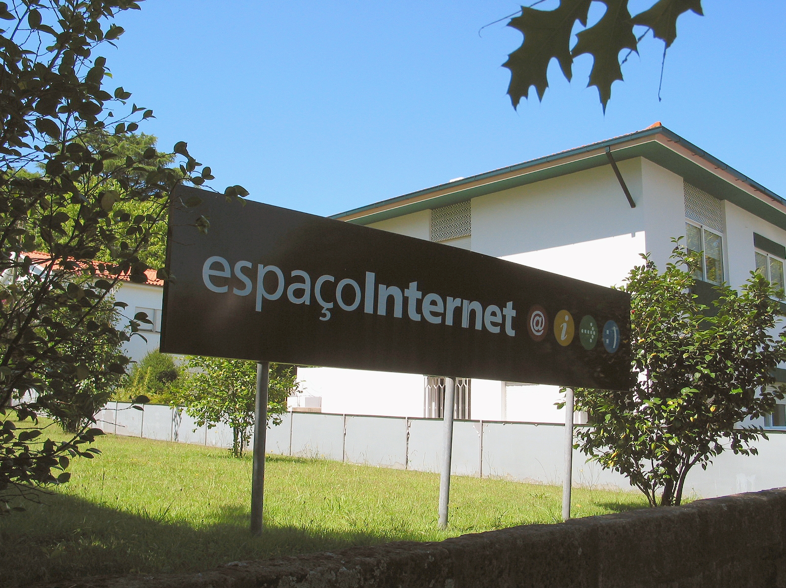 Espaço Internet da cidade de Ponta de Lima